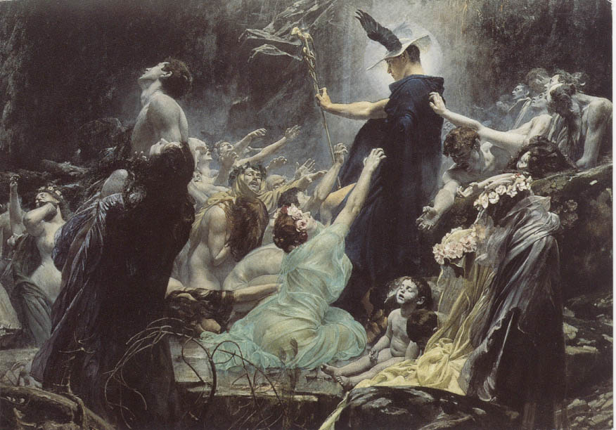 Symbolismera QS:P2348,Q164800